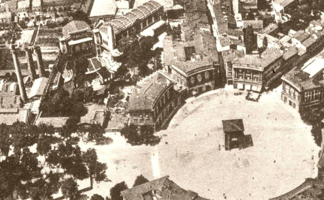 Teatro alhambra all'inizio del 900.jpg